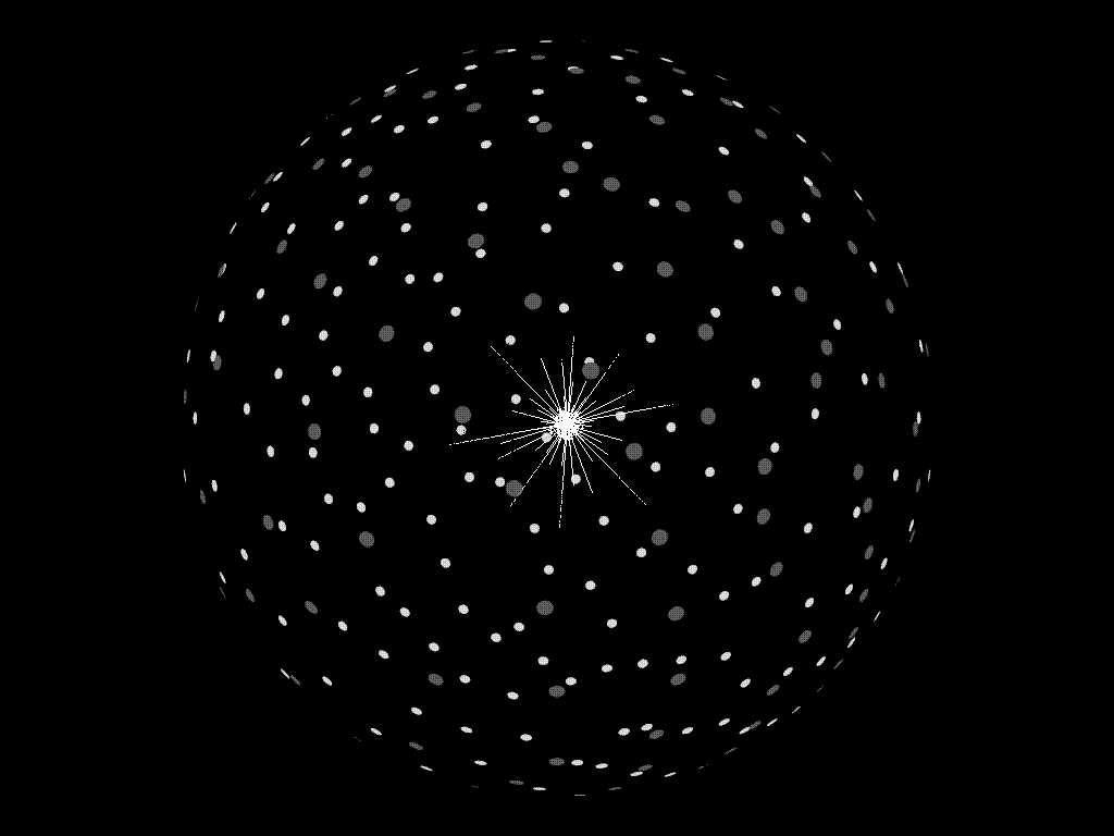 Einfache Illustration eines Dyson-Schwarmes.